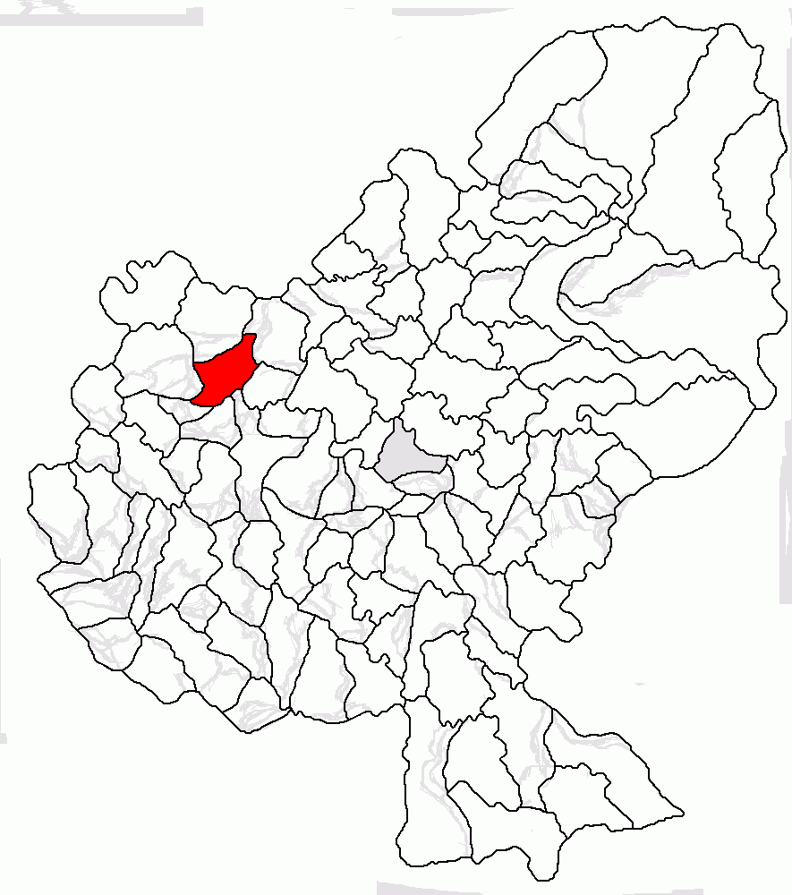 Categorie:Hărţi ale judeţului Mureş